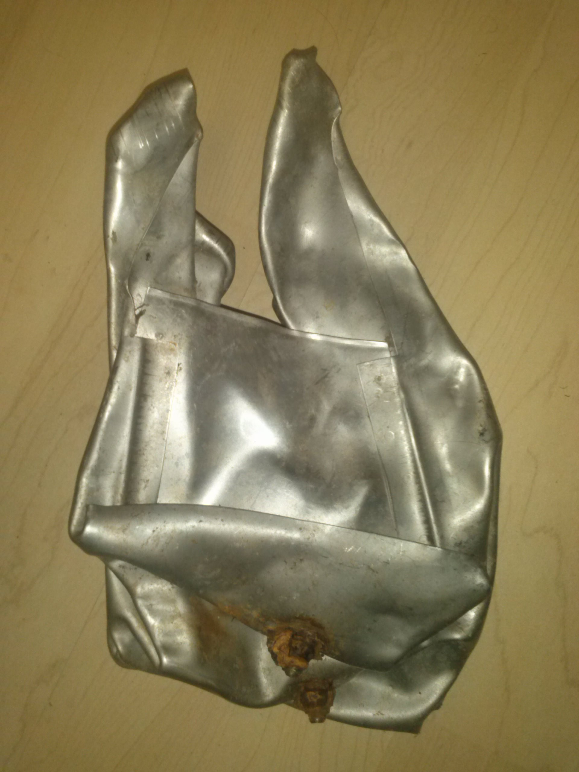 Wrackteile einer B-17, die am 10. Mai 1944 bei Markt Allhau/Österreich abgeschossen wurde.